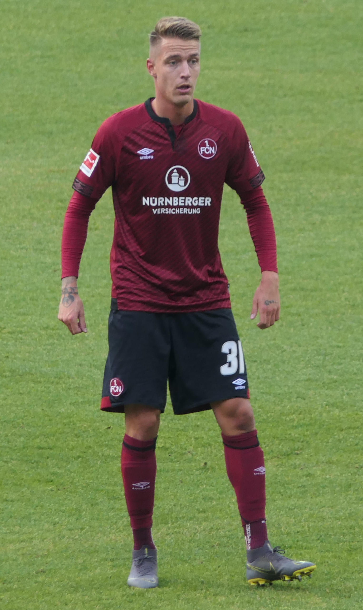 Der Fussballprofi Ondrej Petrak vom 1.FC Nürnberg beim Heimspiel gegen Werder Bremen am 02.02.2019.